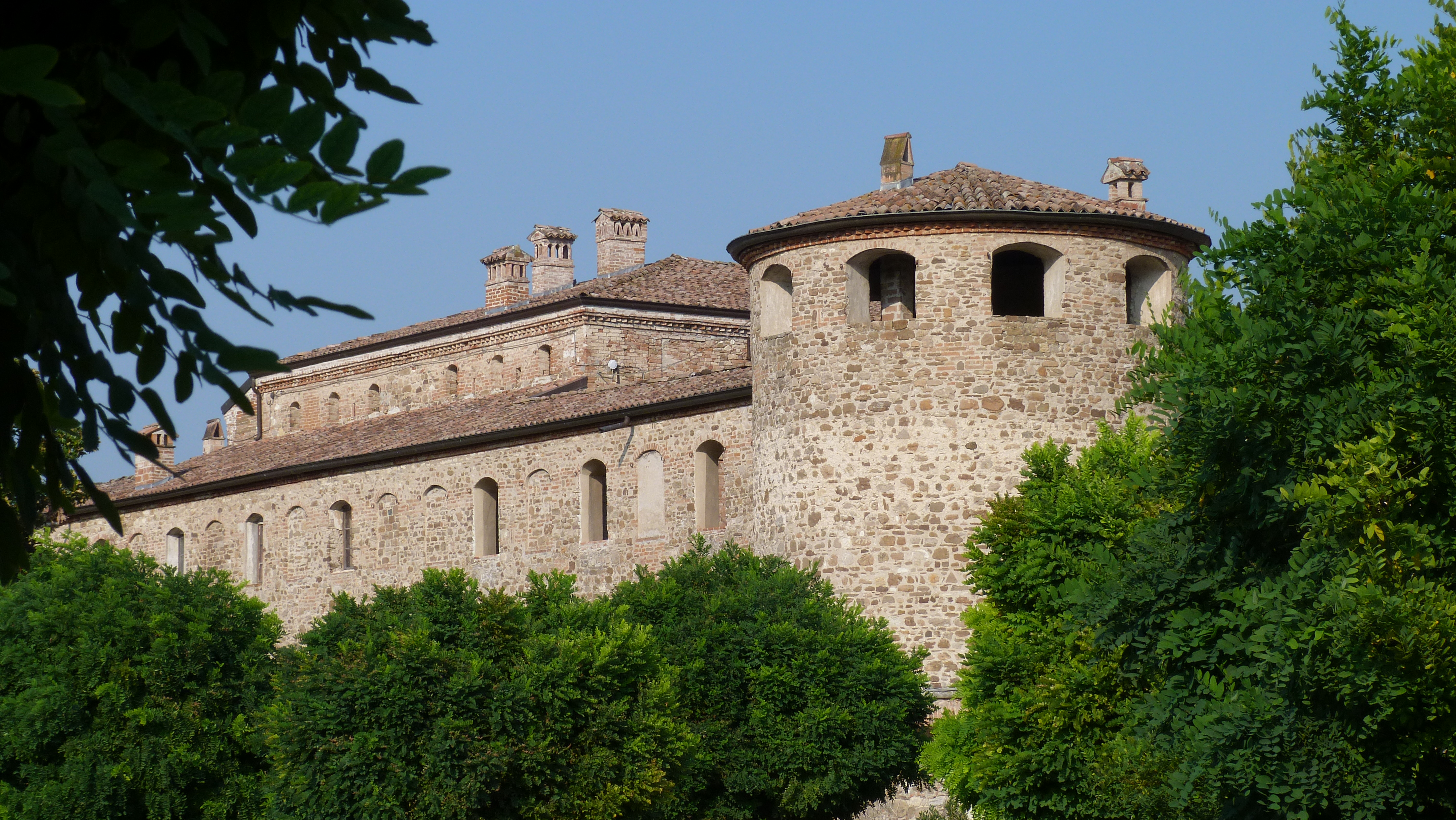 Rocca e Castello di Agazzano - MIBAC This is a photo of a monument which is part of cultural heritage of Italy.